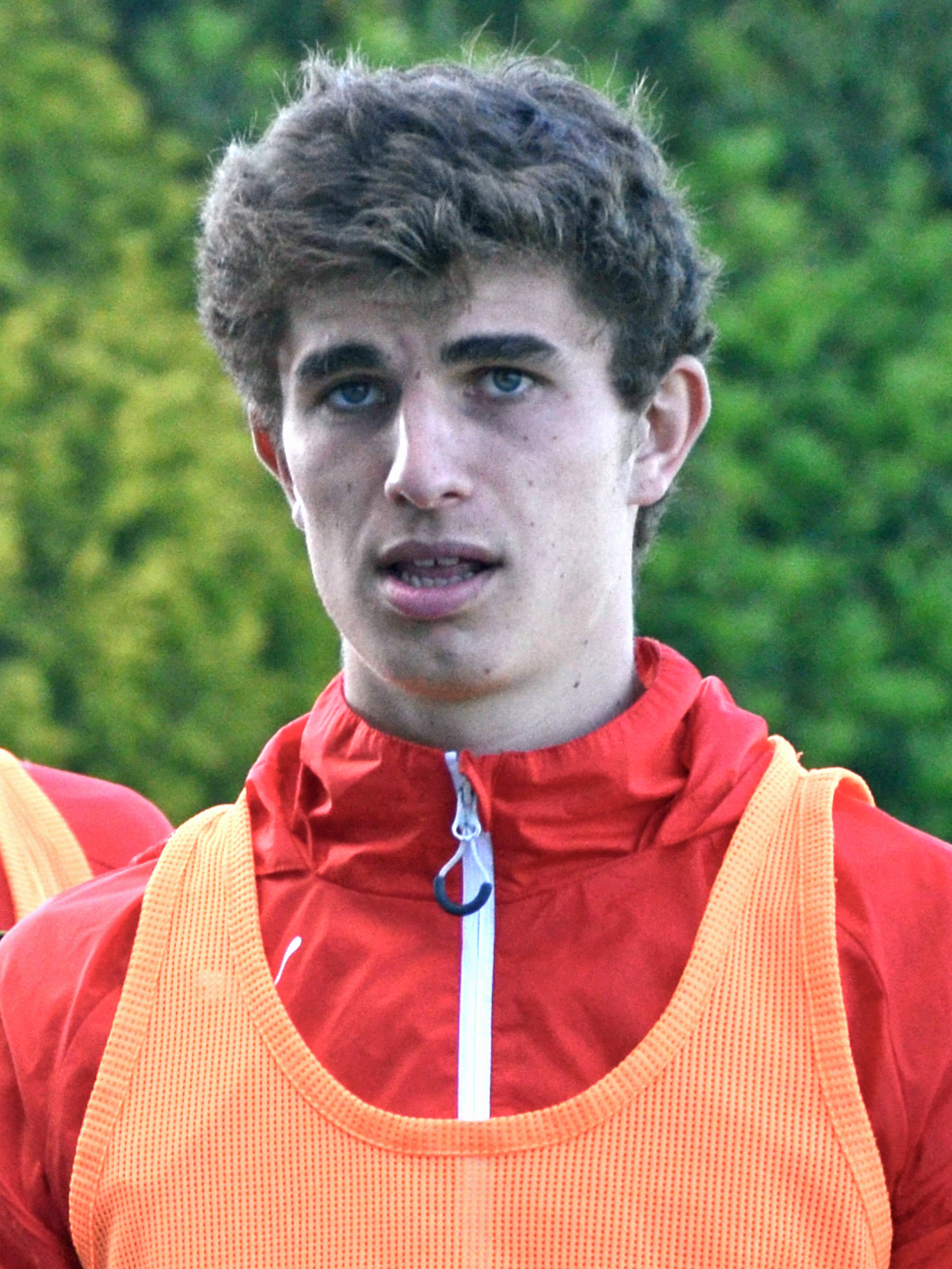 Photographie de Pierre-Yves Hamel lors d'un match de CFA2 opposant le FC Saint-Lô au Stade rennais le 23 mai 2015.